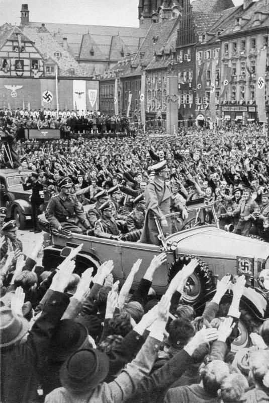 Sudetendeutschland: Eger empfängt den Führer.